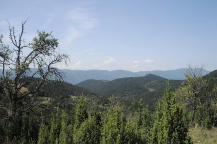 Gornje Dubovo, selo kod Višegrada - zima u selu.